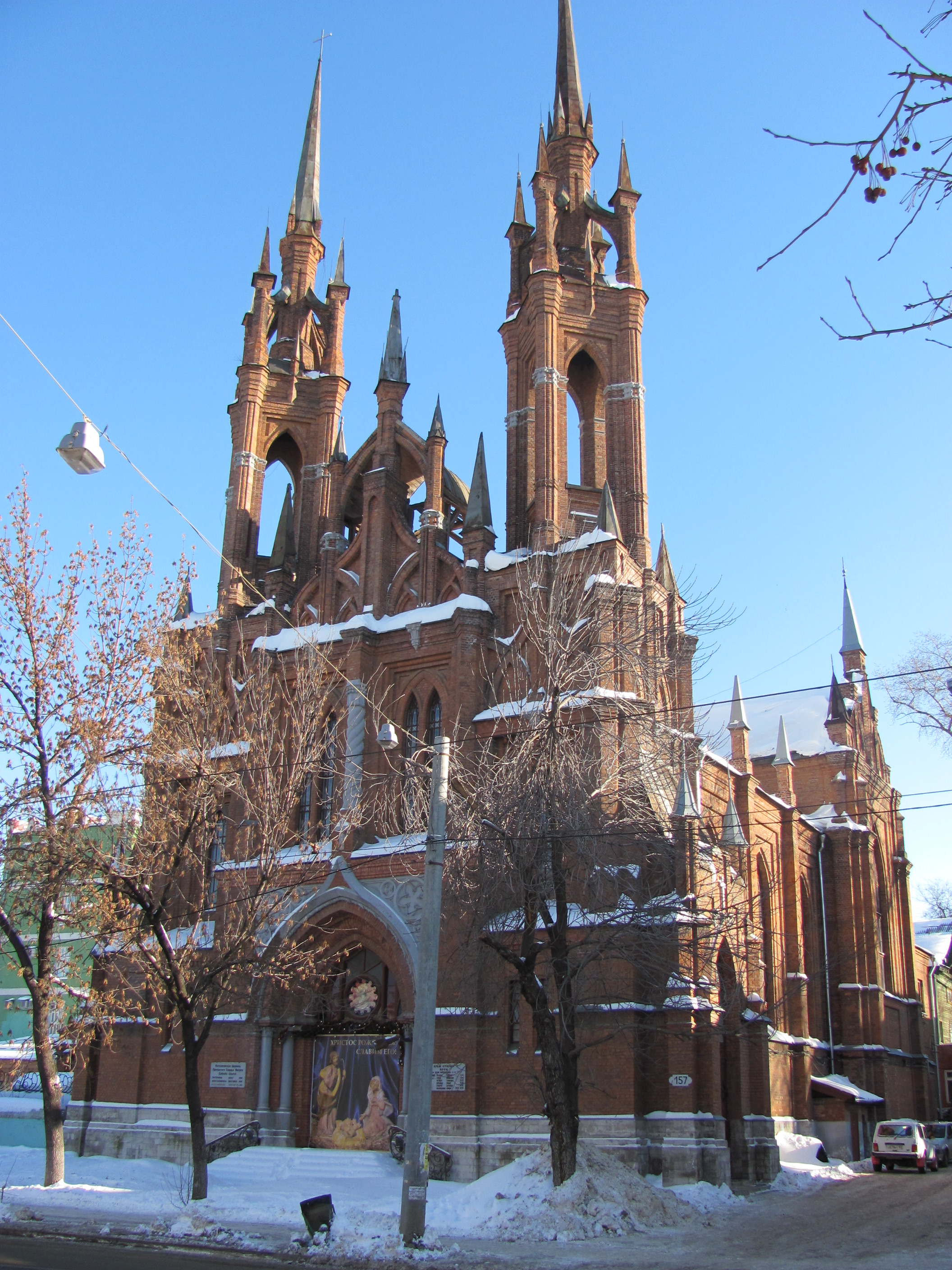 Польский костел: улица Фрунзе, 157, Самара, Самарская область